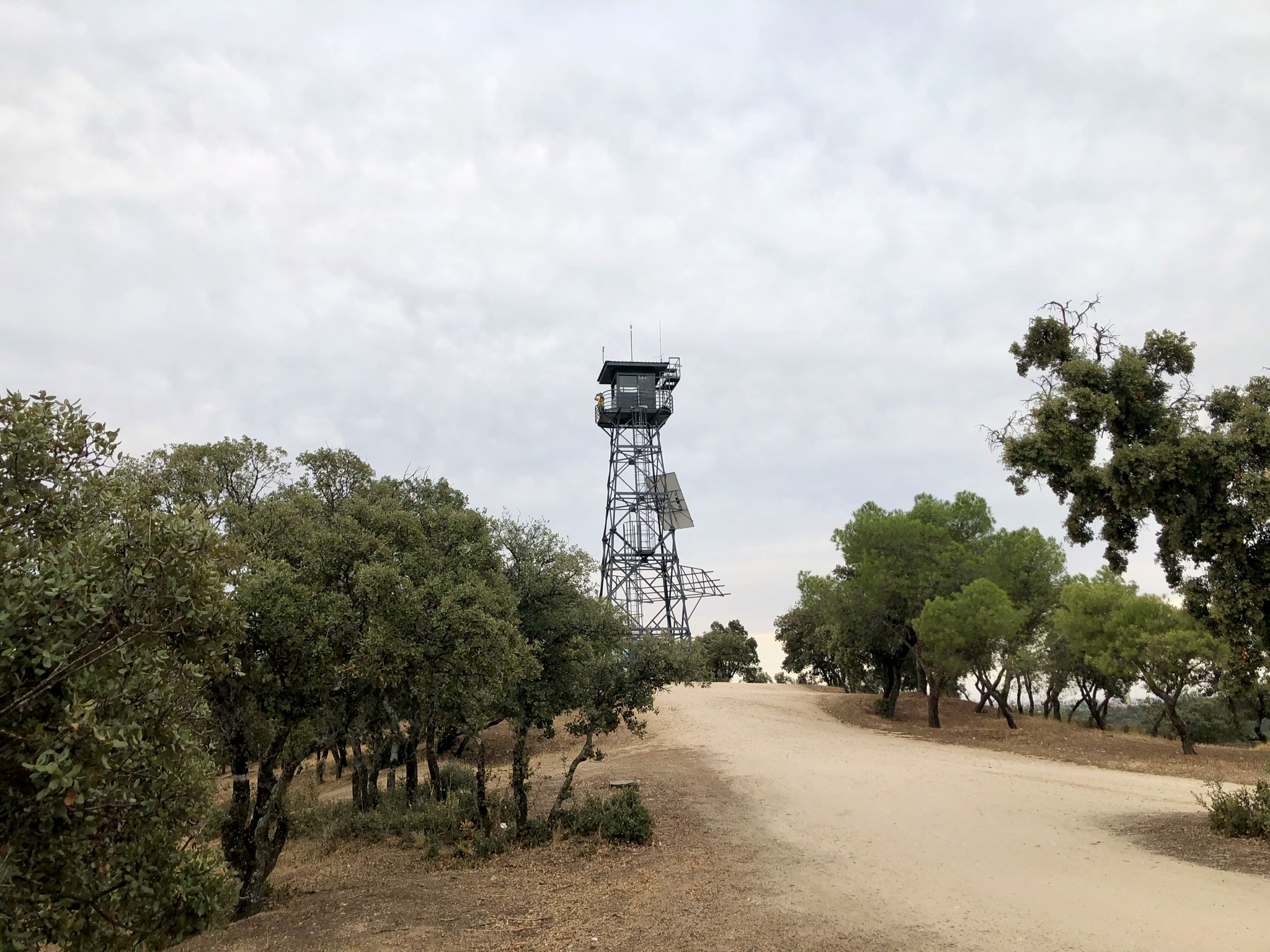 Cerro de Garabitas. Parque histórico de la Casa de Campo. Madrid, España.